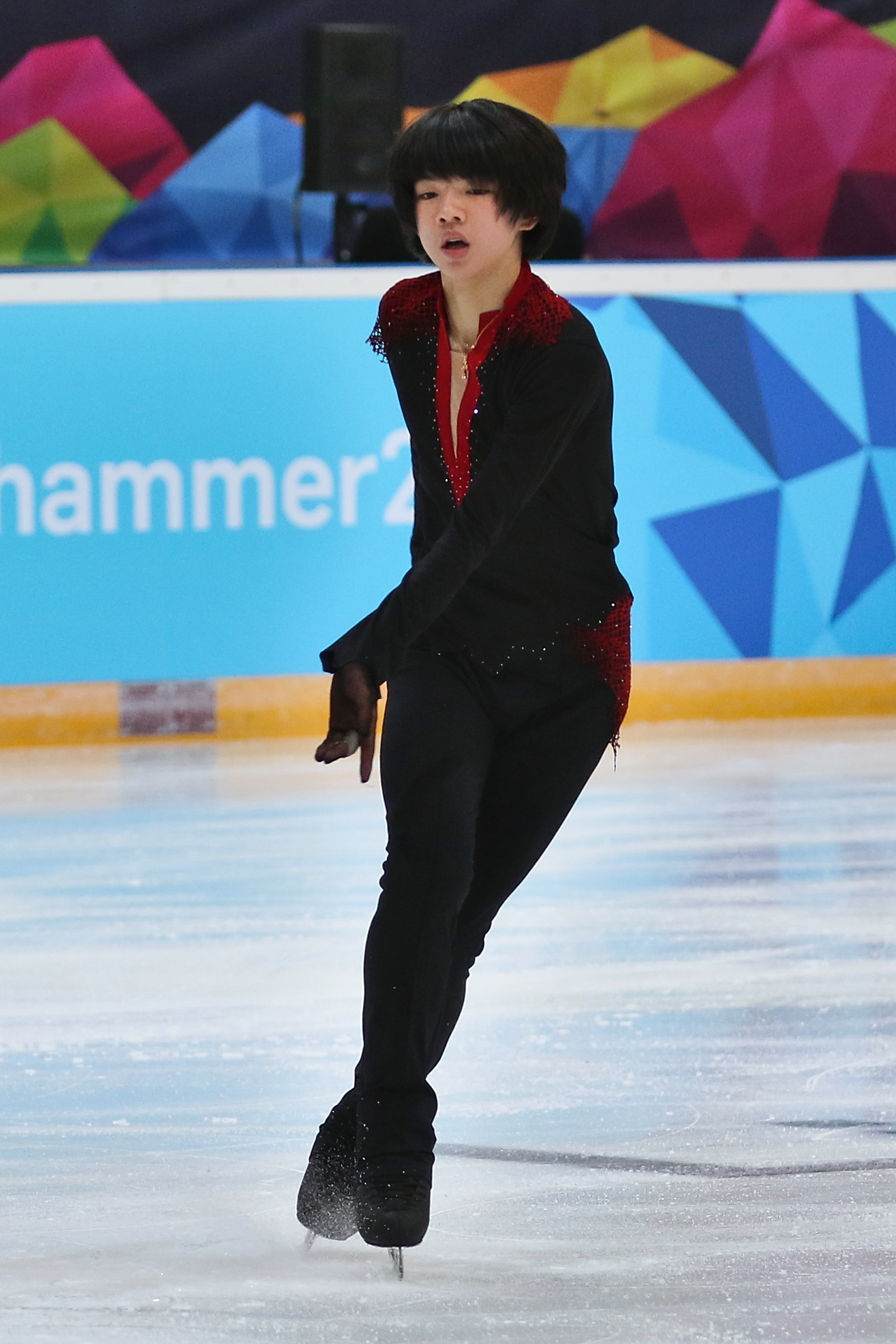 Lillehammer 2016 - Figure Skating Men Short Program - Jun Hwan Cha